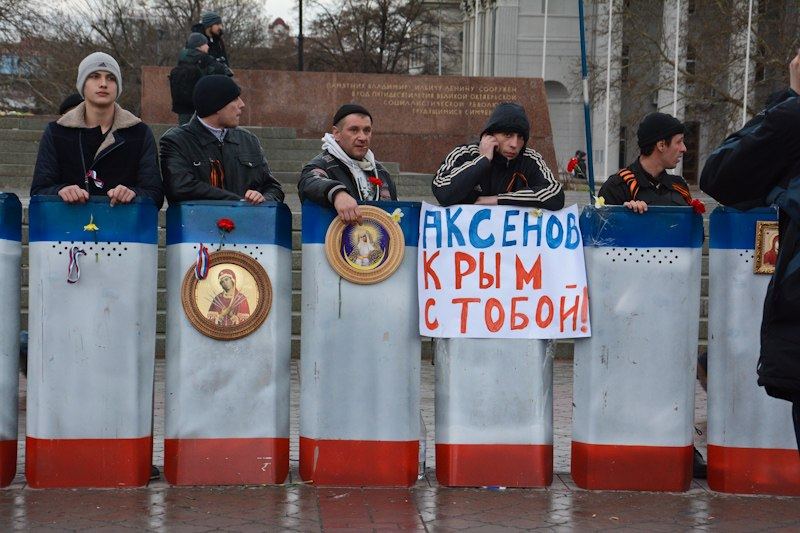 Отряд самообороны Крыма с щитами раскрашенными в цвета флага республики Крым охраняют памятник Ленина